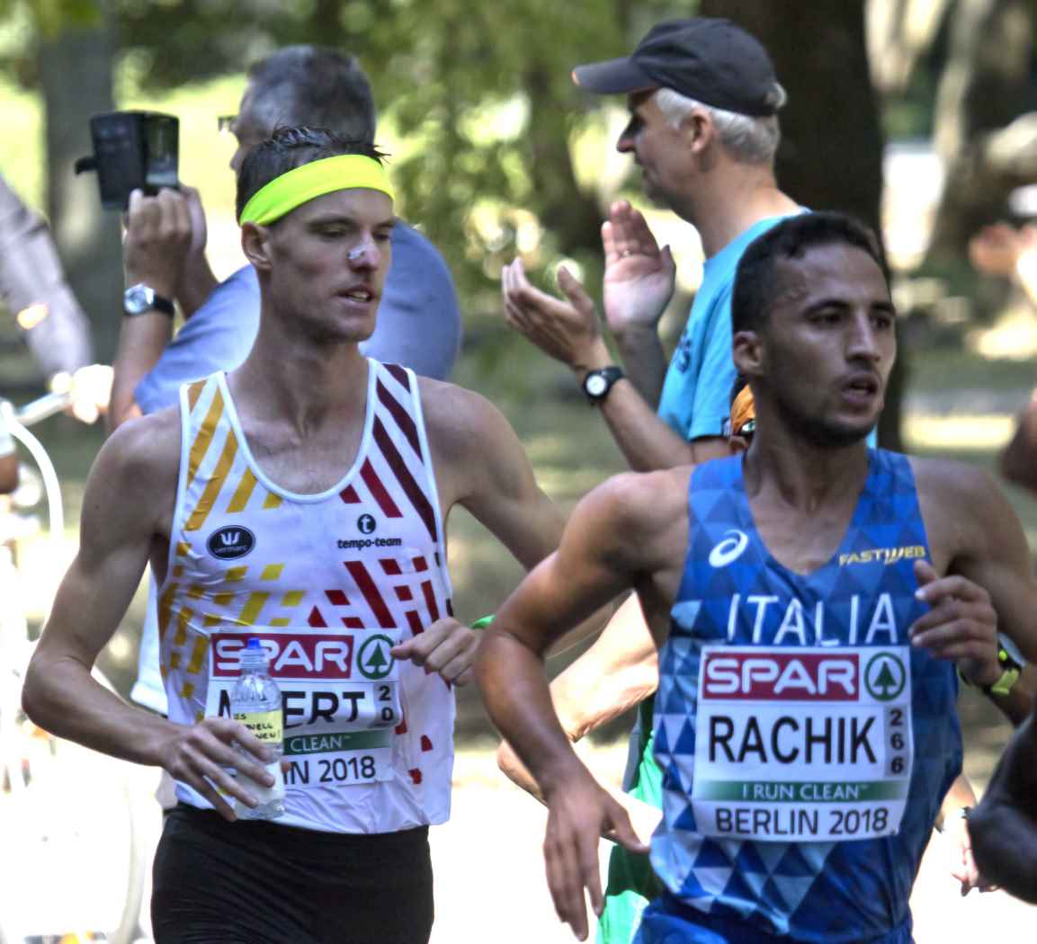 EKB52817 marathon koen naert